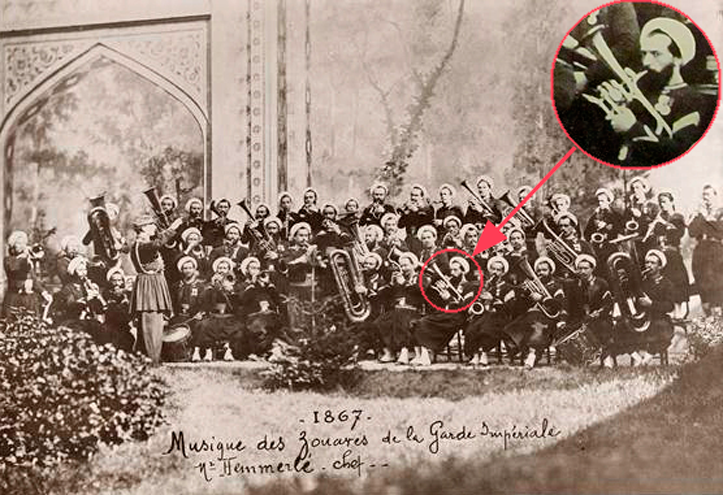 Photo